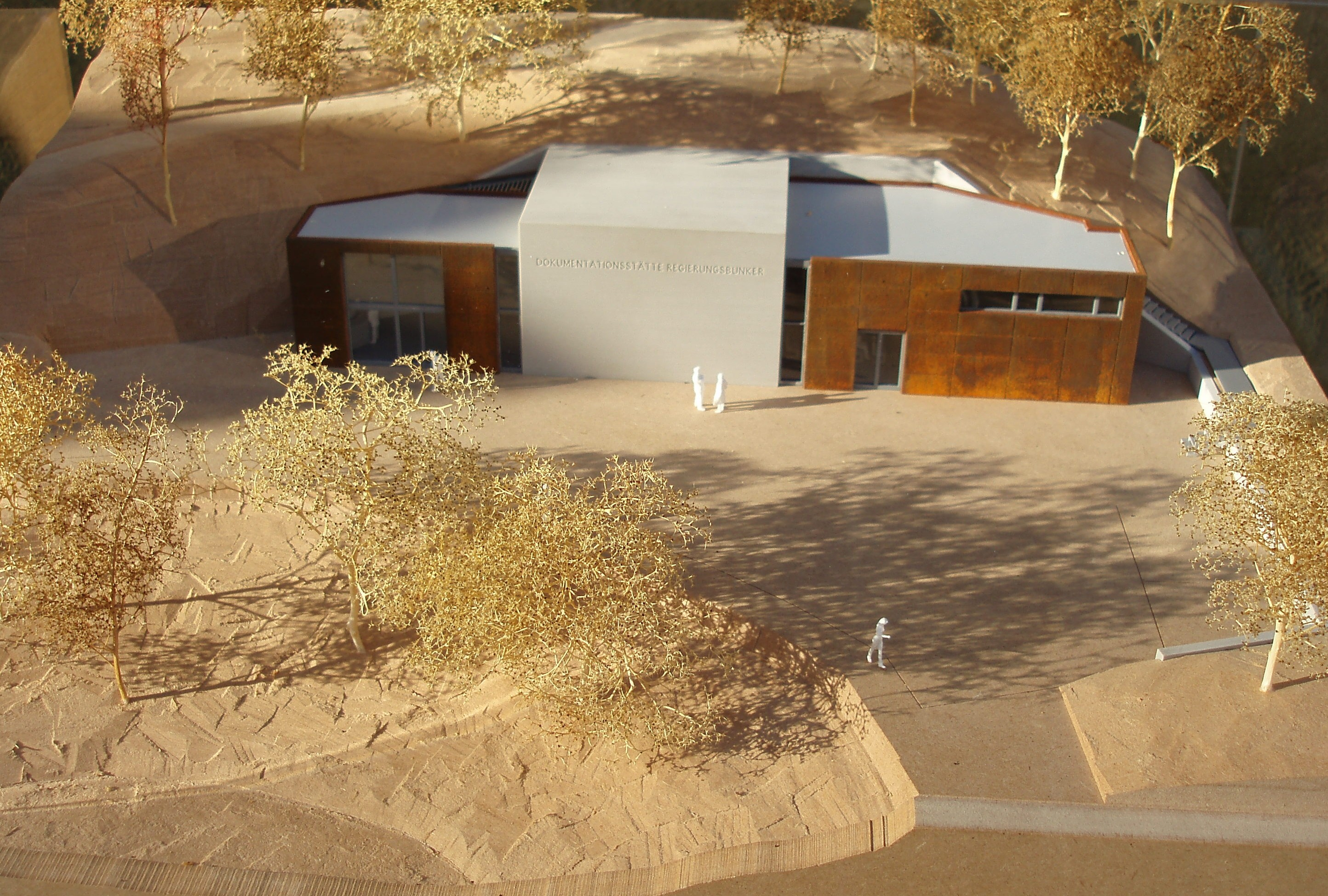 Das Modell zeigt die geplante Außenfassade des Bunkermuseums, zu dem der ehemalige Regierungsbunker im Ahrtal umgewandelt werden soll. Der durch das Ahrtal führende Rotweinwanderweg soll dann umgeleitet werden, so daß er an dem Museumseingang vorbei führen wird.